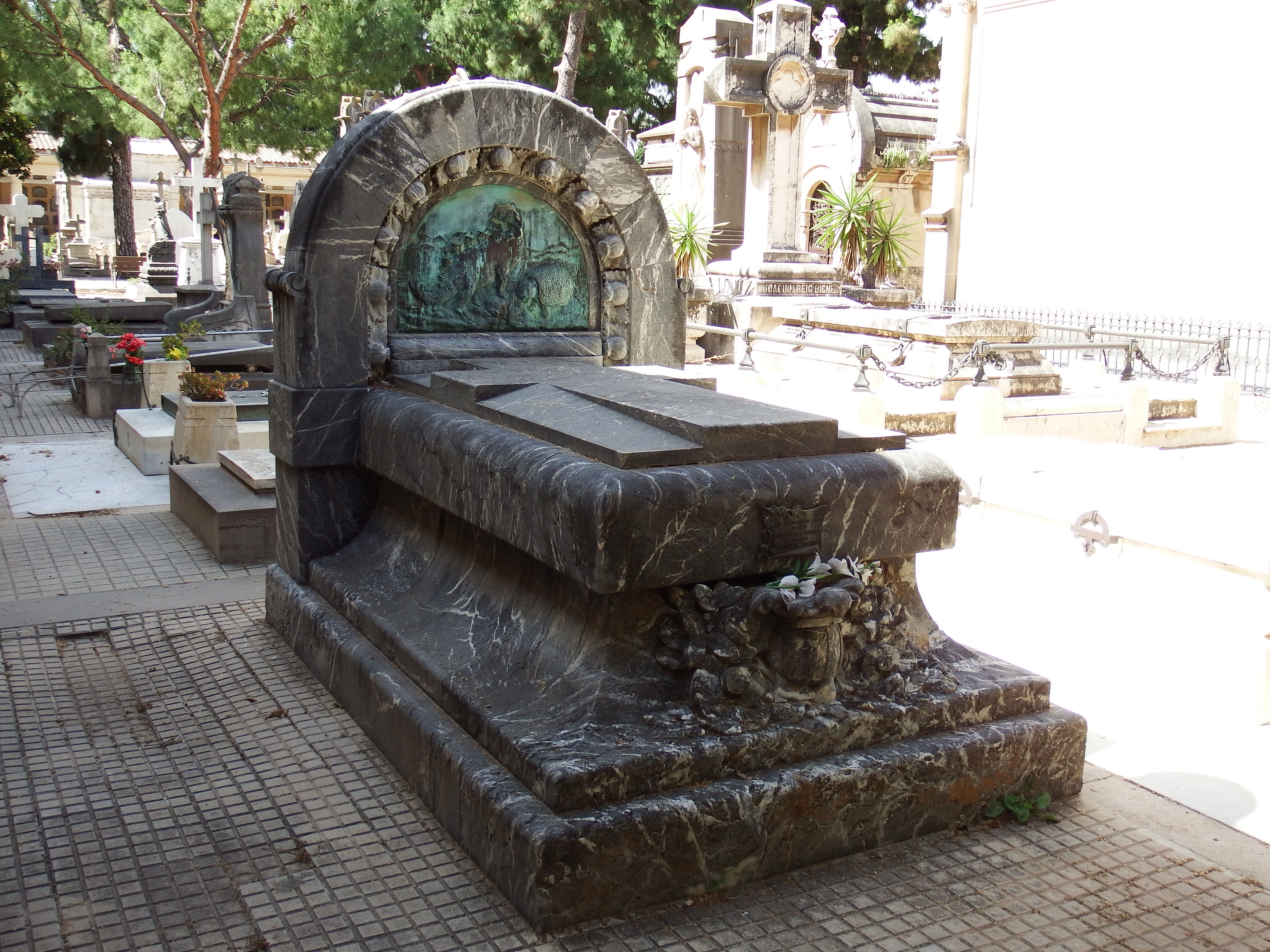 Tumba de José Rodrigo Botet